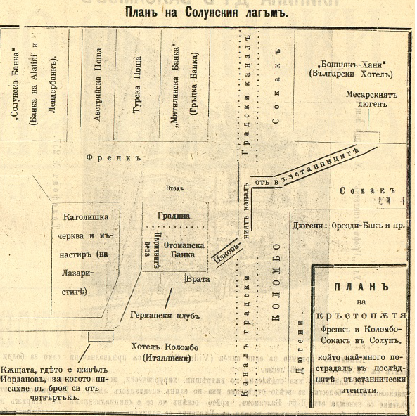 Схема на квартала около улиците „Френк“ и „Коломбо“ в Солун, на която е нарисуван тунелът, прокопан от гемиджиите през 1903 г. за взривяването на „Банк Отоман“. „Македоно-одрински куриер“ (София), № 12, 26 април 1903 г.